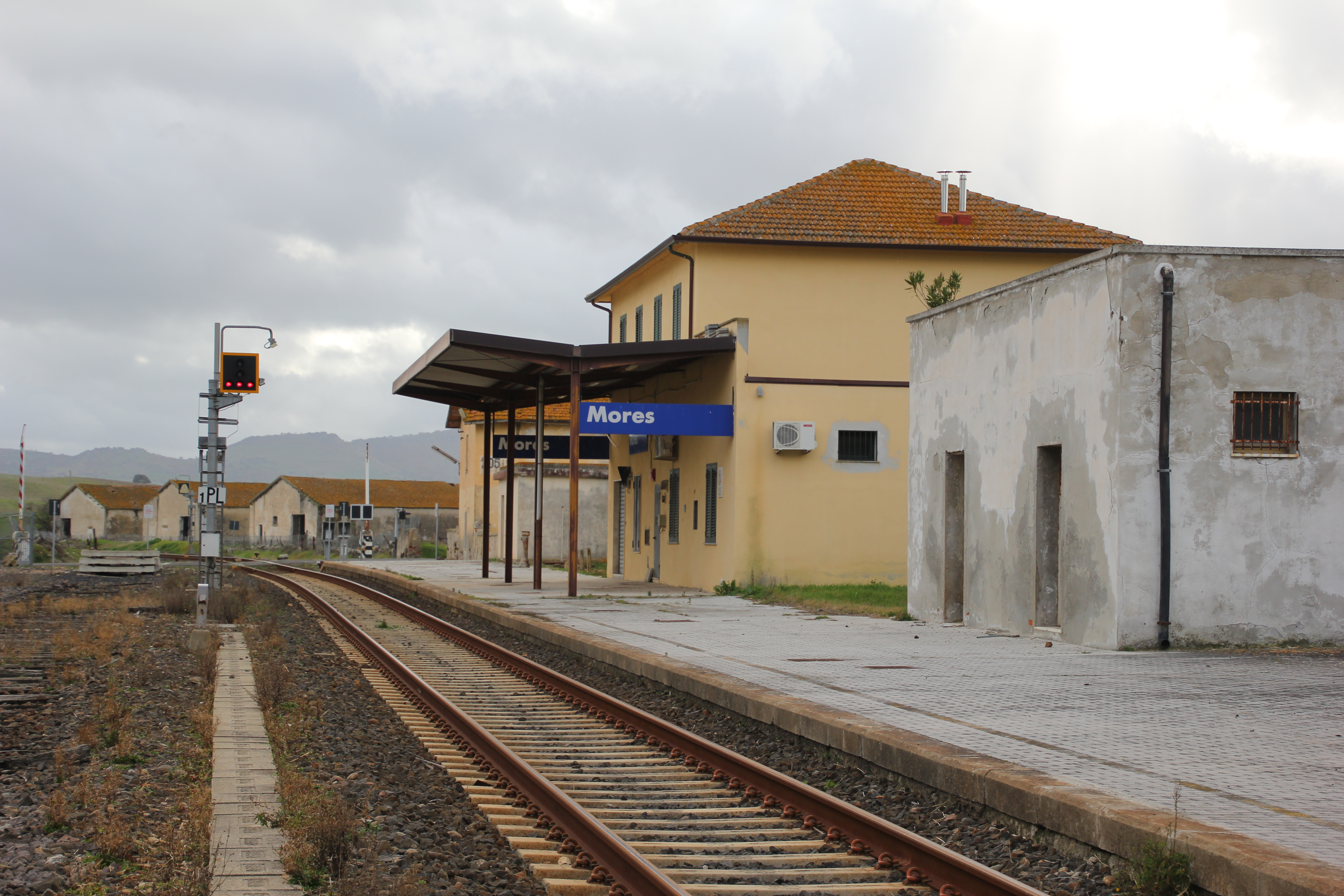 Mores - Stazione ferroviaria